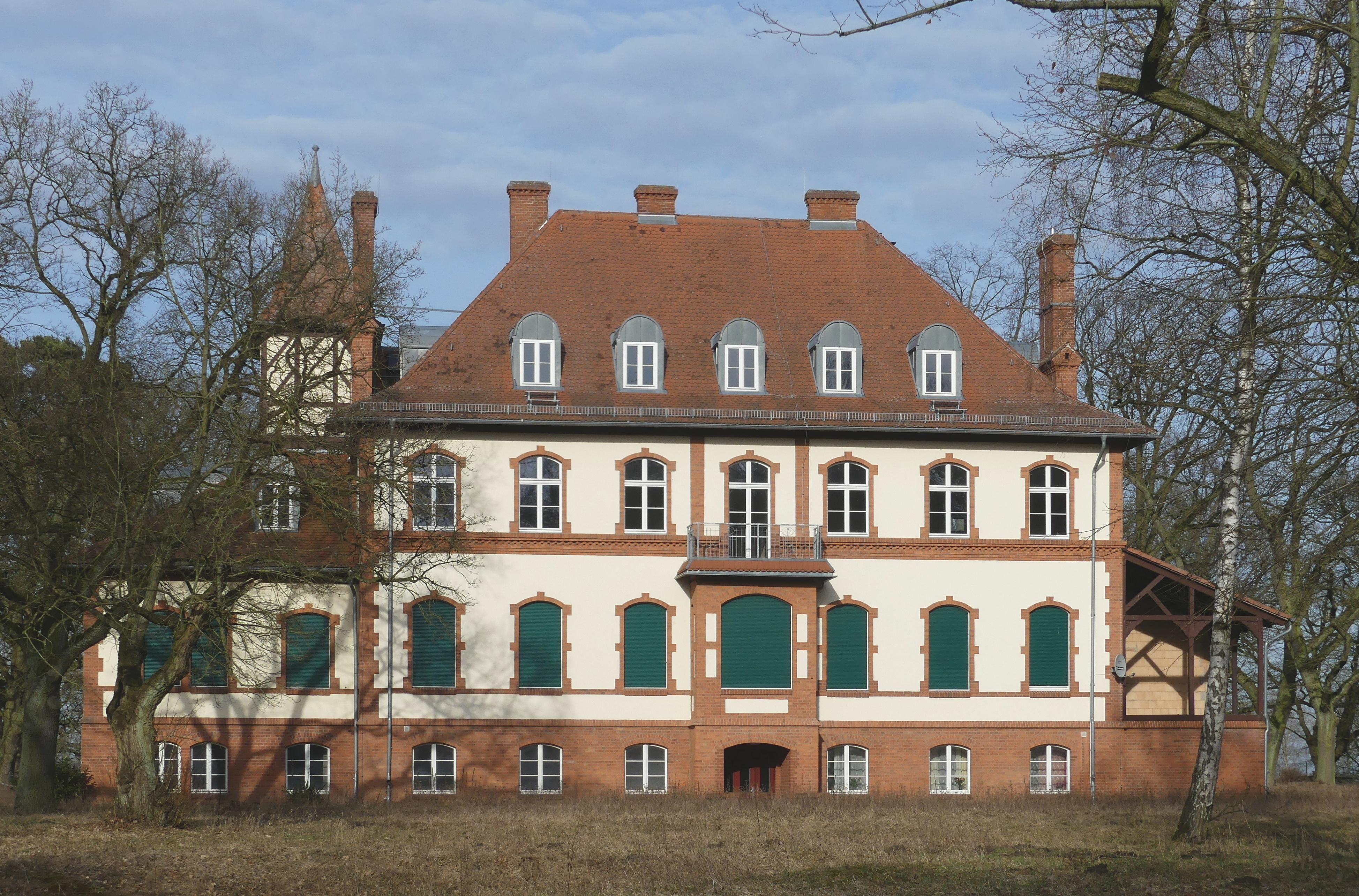 Das Schloss präsentiert sich von seiner Rückseite (hier abgebildet) schöner und vollkommender als von seiner Schauseite, wo der Blick durch Bäume beeinträchtigt ist.